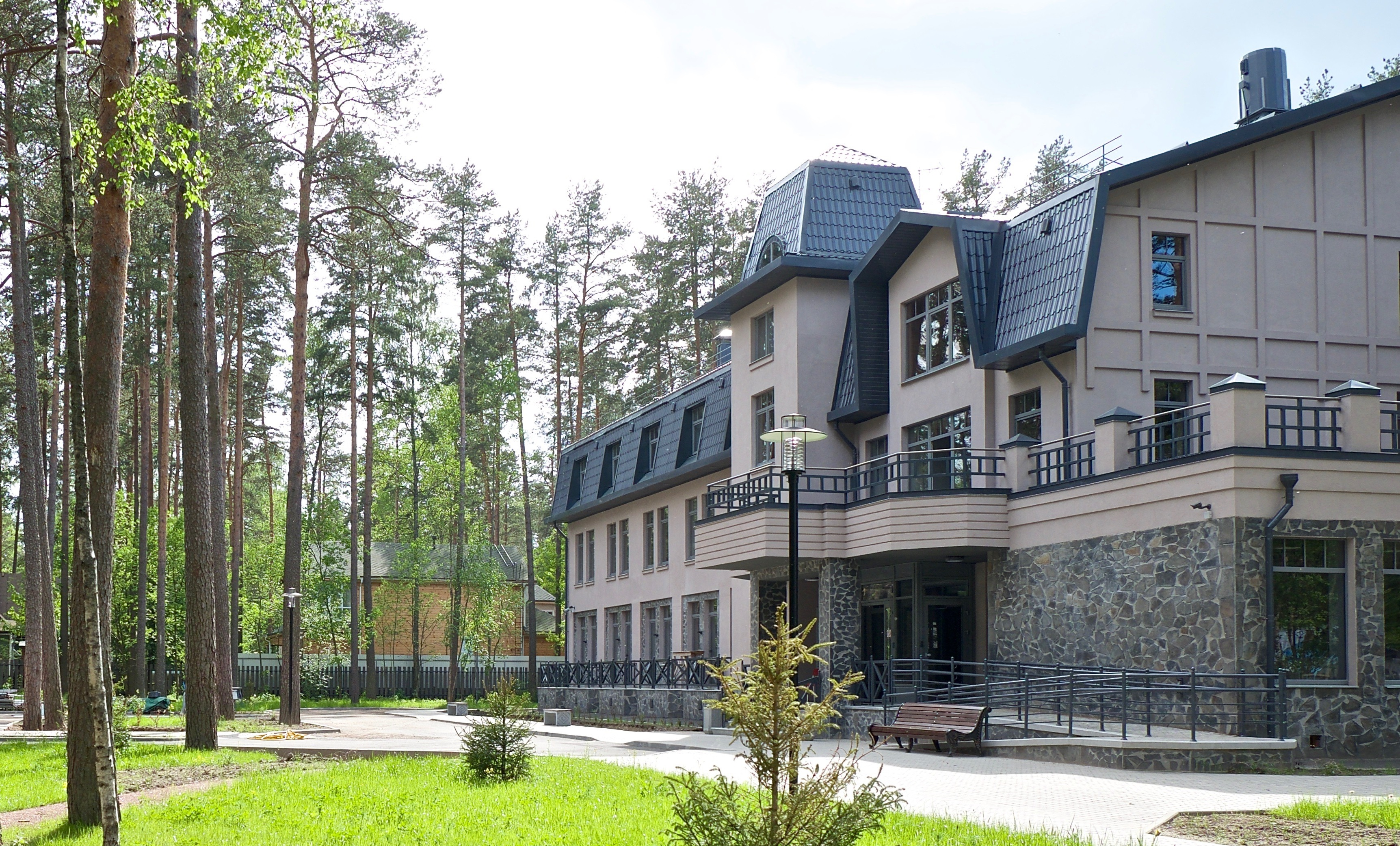 Оздоровительно-реабилитационный пансионат «Спутник» в Комарово